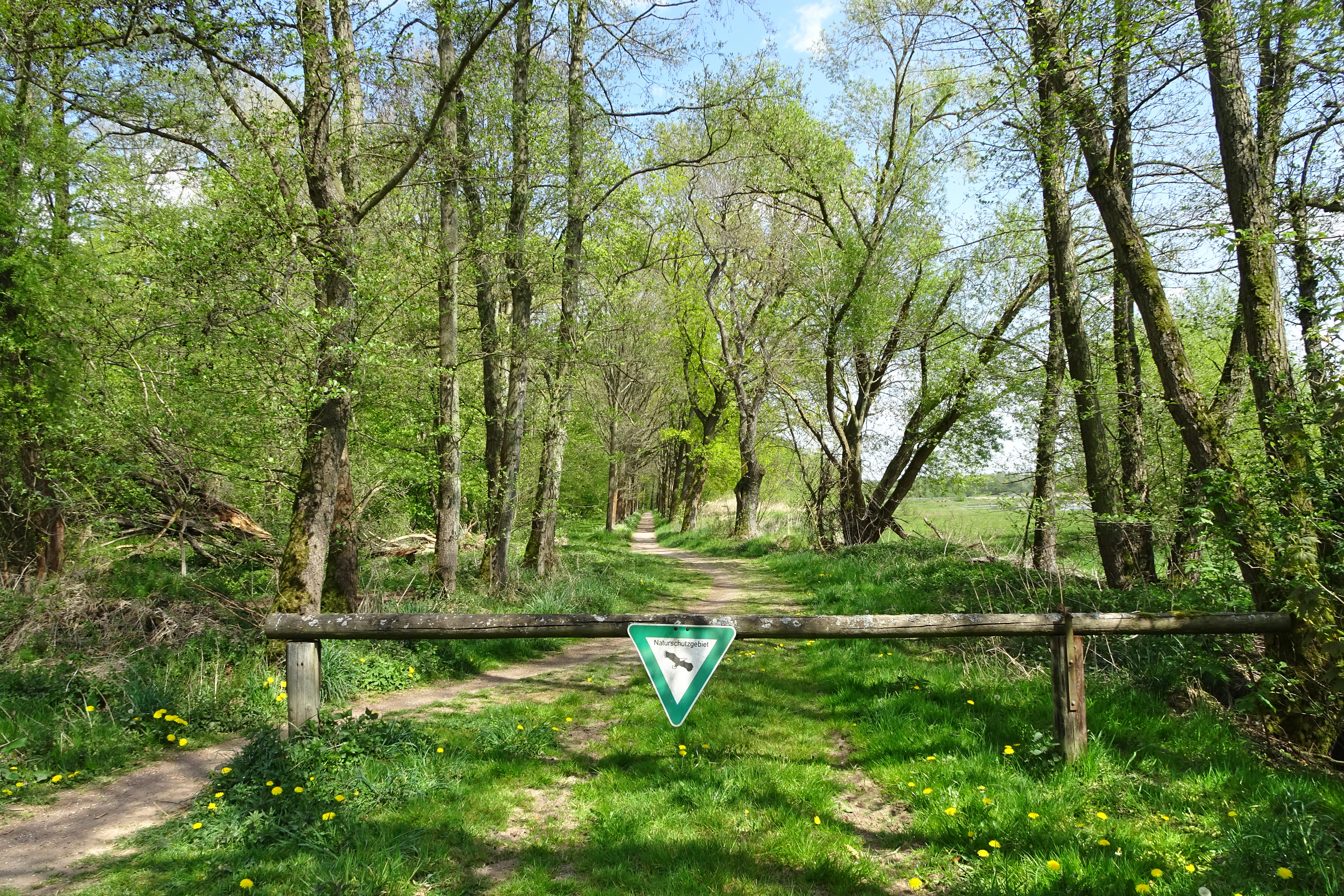 Der „Rhäden bei Obersuhl und Bosserode“ liegt in den Gemarkungen Obersuhl und Bosserode der Gemeinde Wildeck im nordosthessischen Landkreis Hersfeld-Rotenburg. Auslaugungen von Kalisalzen aus dem, aus marinen Sedimenten entstandenem Zechsteinund tektonische Vorgänge haben zu einem schrittweisen Nachsacken des Untergrunds geführt. Die einstige Sumpflandschaft wurde ab der Mitte des 19. Jahrhunderts trockengelegt und bis in die Nachkriegszeit bearbeitet. Mit dem Ausbau der DDR-Grenzanlagen verfiel das Entwässerungssystem, was zur Aufgabe der landwirtschaftlichen Nutzung führte. In den 1970er Jahren begannen Naturschützer mit den Arbeiten zur Rückführung des Rhädens zu einem Feuchtbiotop, um den in ihrem Bestand bedrohten Pflanzen- und Tierarten einen angemessenen Lebensraum zu sichern. Nach abgeschlossener Rekultivierung war (wieder) eine Auenlandschaft entstanden, die vor allem für Vogelarten als Brut-, Nahrungs- und Rastgebiet überregionale Bedeutung besitzt.